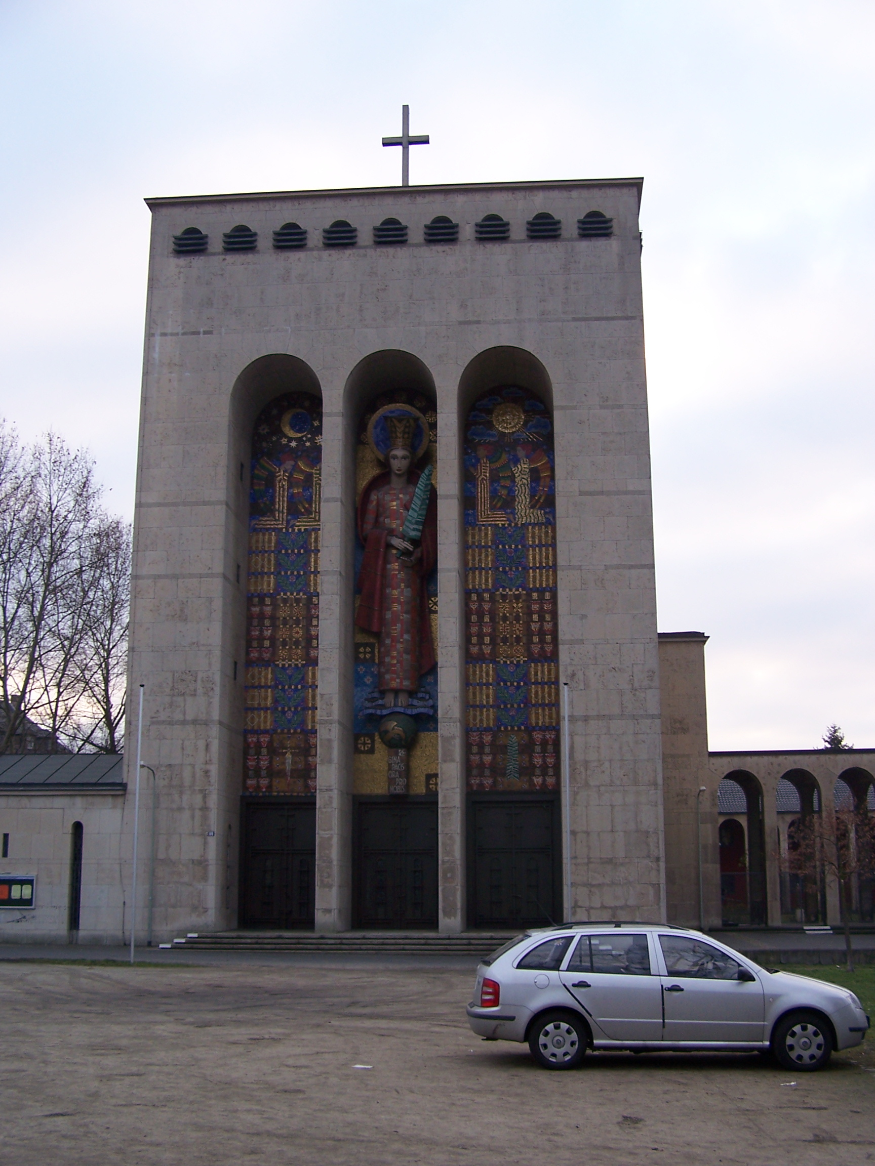 Portal der Frauenfriedenskirche Frauenfriedenskirche